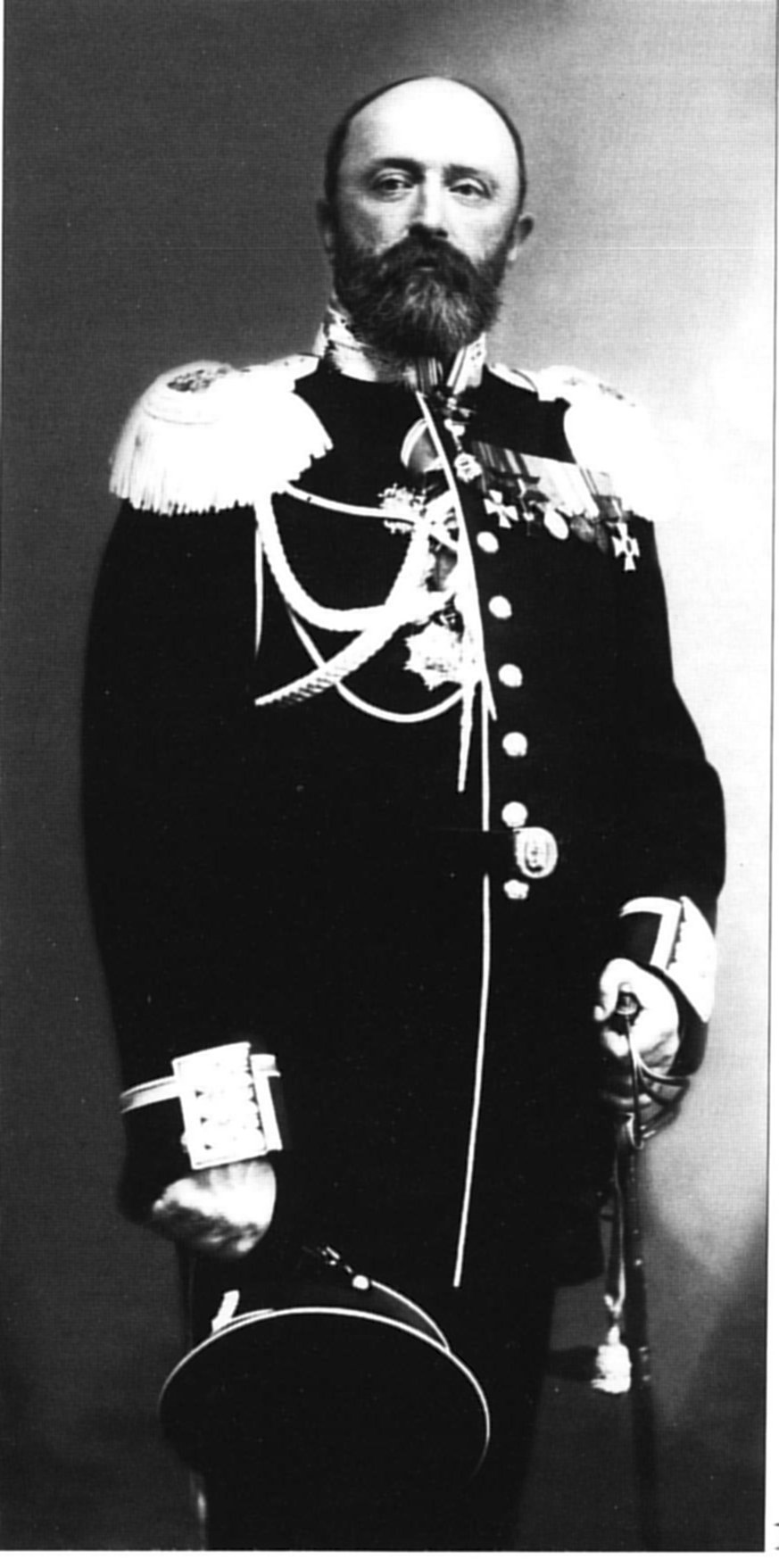 Контр-адмирал Всеволод Фёдорович Руднев